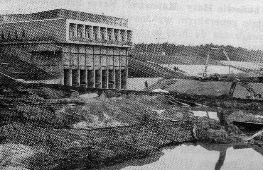 Budowa pompowni nr 1 w Dziećkowicach.